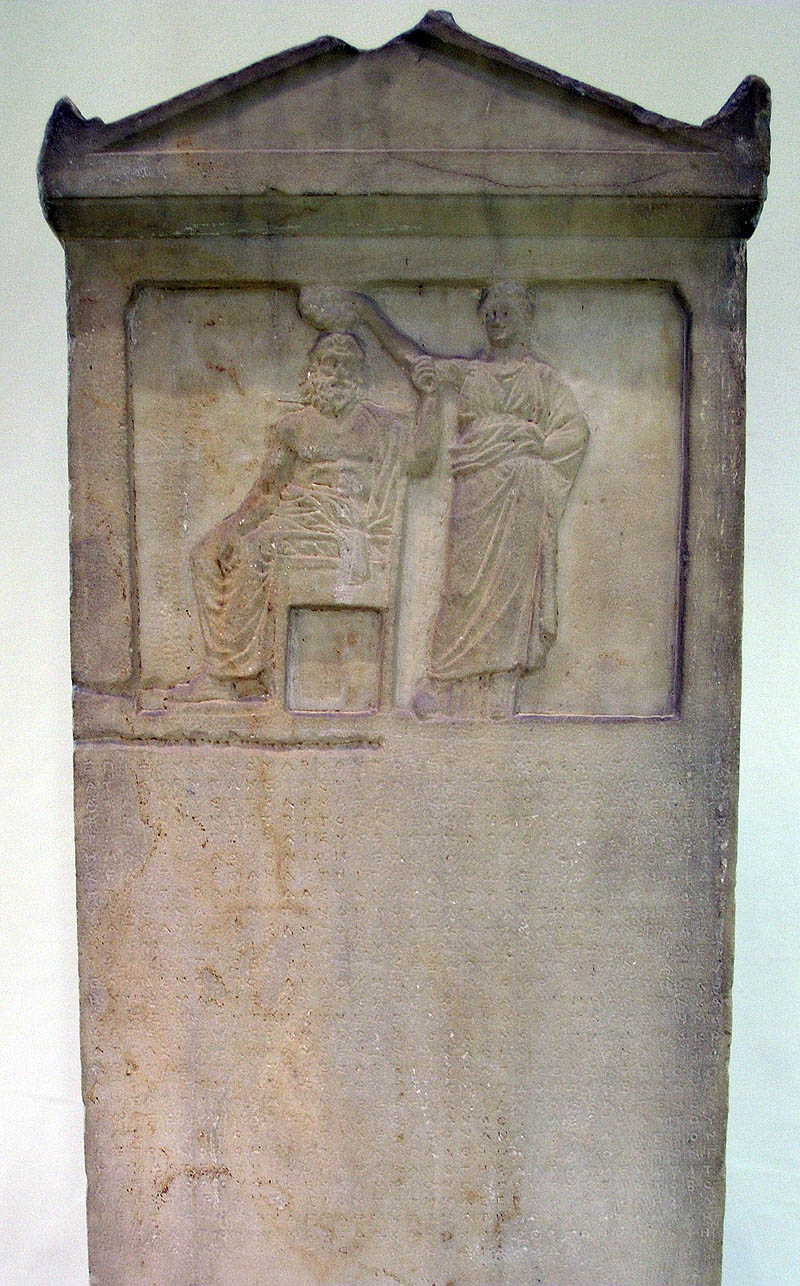 Die Stele van Demokrasie in die Museum van die Antieke Agora van Athene: Die Atheense wet teen tirannie van 336/7 v.C. het die Atheense twyfel oor die vooruitsigte vir hul demokrasie gereflekteer. Die reliëf aan die bokant van die stele is die personifikasie van Dêmos wat deur Demokrasie bekroon word.